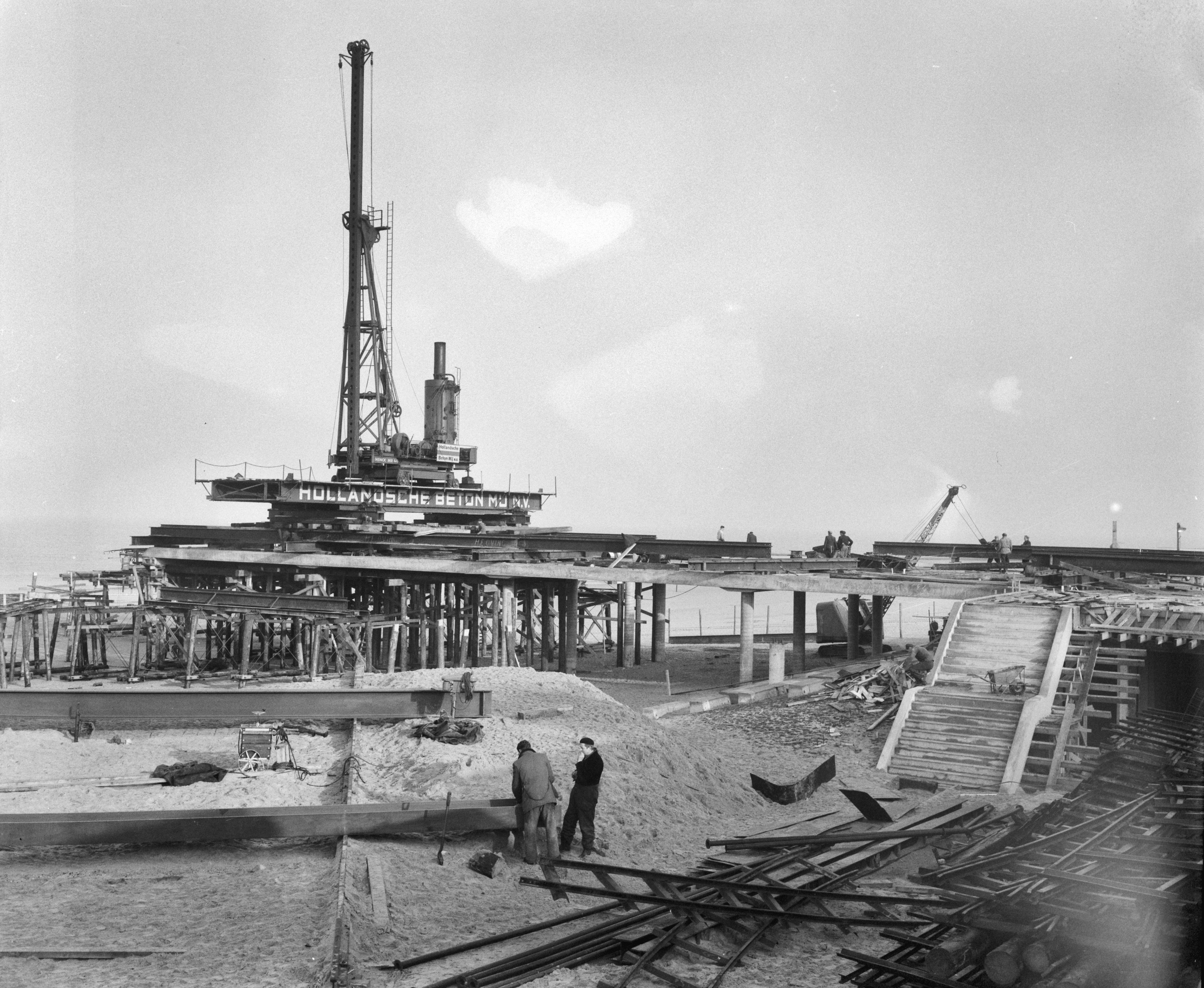 Collectie / Archief : Fotocollectie Anefo Reportage / Serie : [ onbekend ] Beschrijving : Werkzaamheden aan de nieuwe pier te Scheveningen Datum : 3 februari 1960 Locatie : Scheveningen, Zuid-Holland Trefwoorden : Werkzaamheden Fotograaf : Behrens, Herbert / Anefo Auteursrechthebbende : Nationaal Archief Materiaalsoort : Negatief (zwart/wit) Nummer archiefinventaris : bekijk toegang 2.24.01.04 Bestanddeelnummer : 910-9944